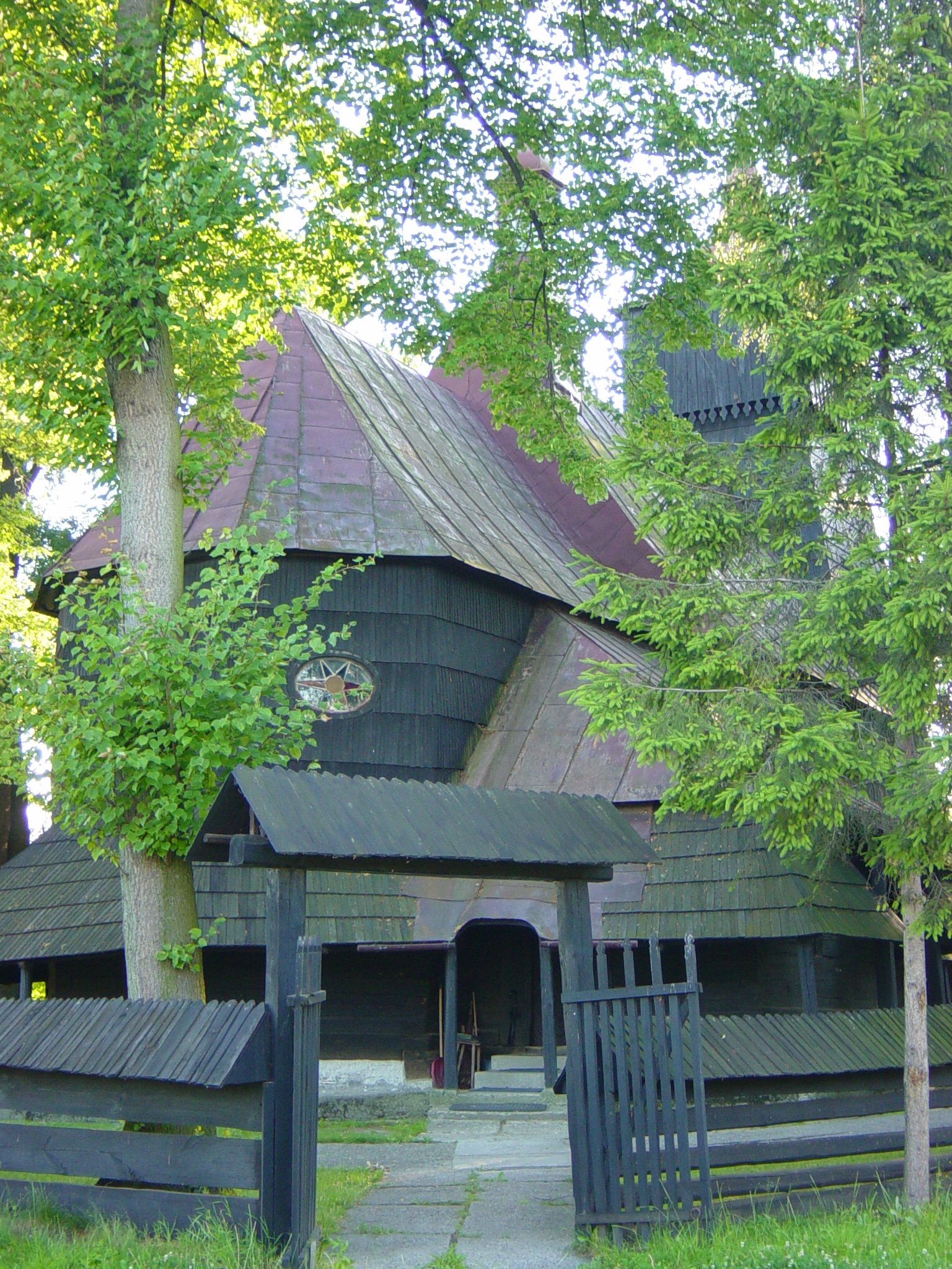 Kościół pw. Św. Bartłomieja z XVI w. w Porębie Wielkiej